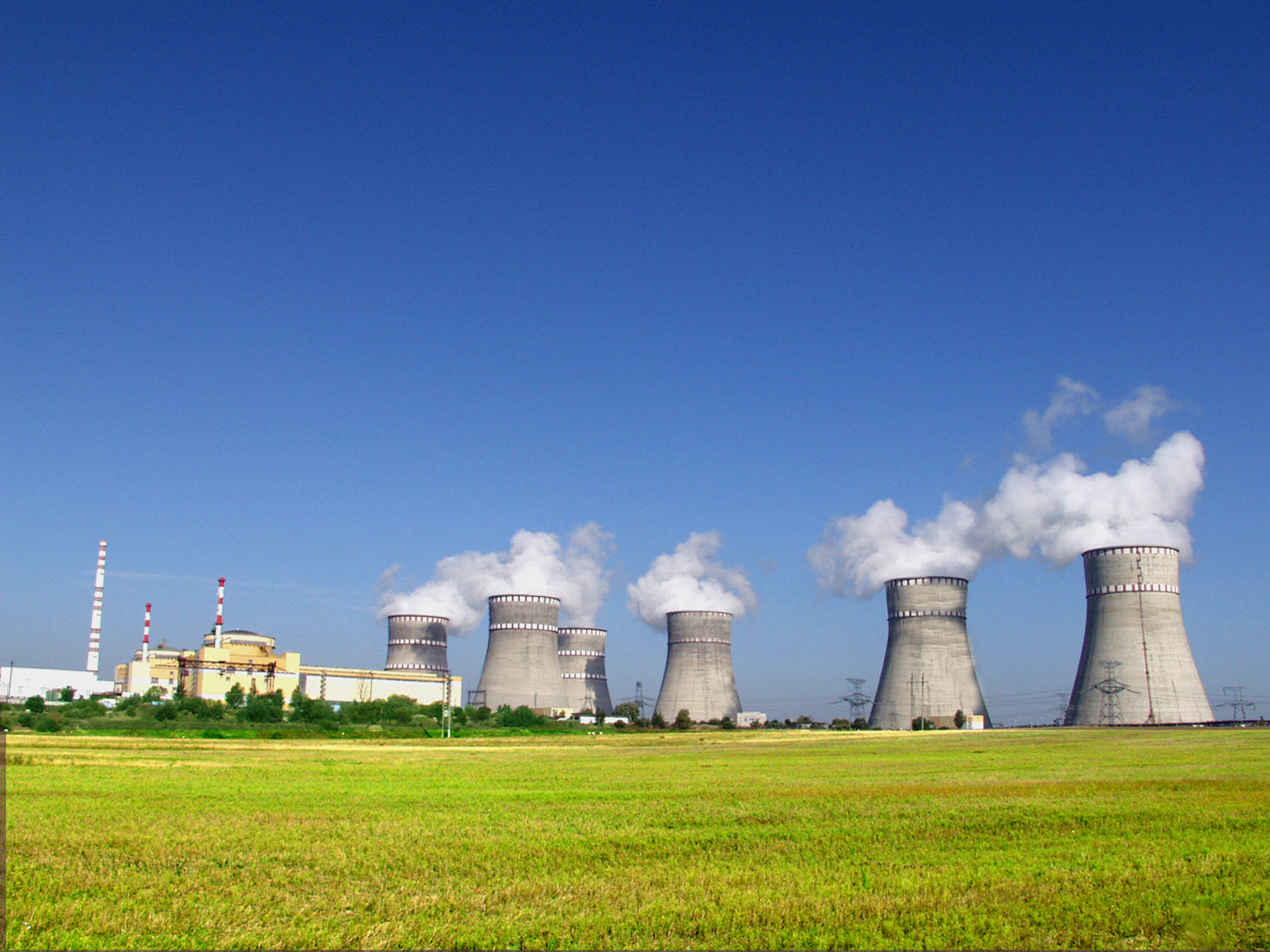 Ровенская АЭС. Украина. 2006 год.